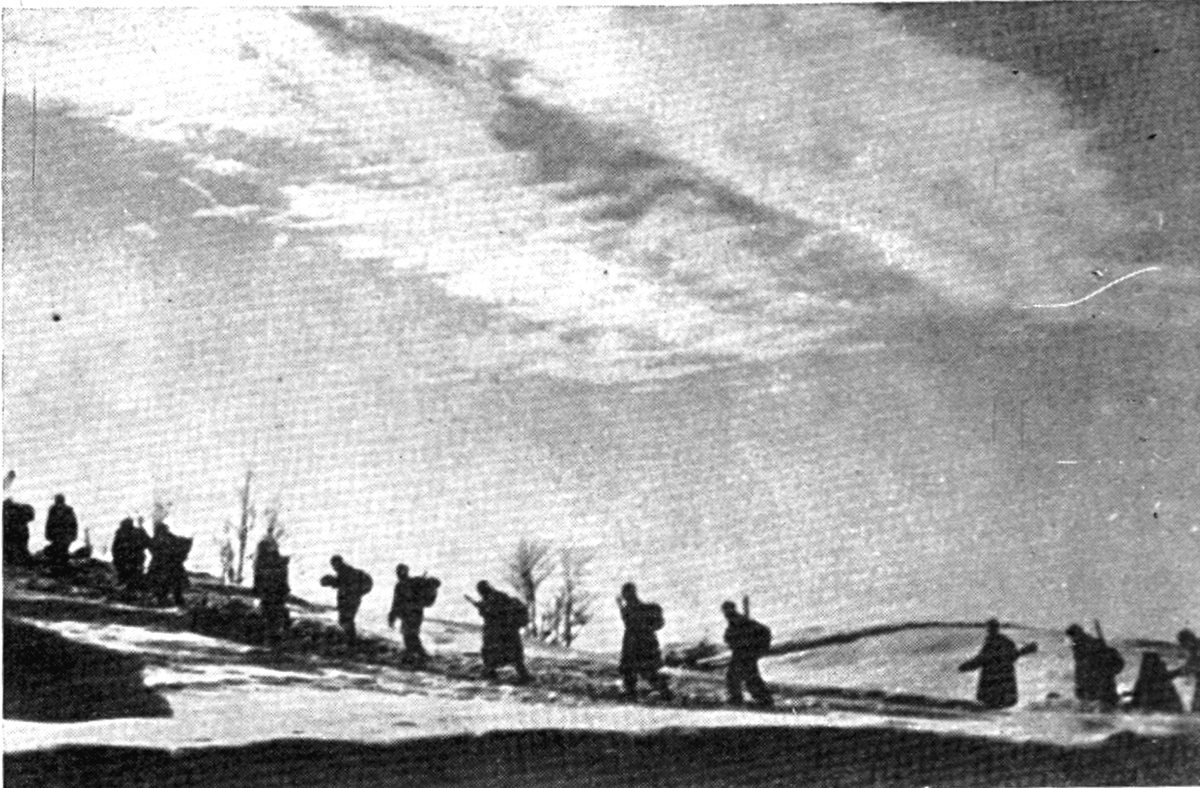 Srpskohrvatski / српскохрватски: Kolona slovenačkih partizana u zimu 1942.